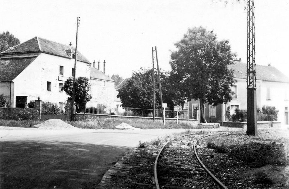 Rails du tramway de Verneuil à Melun (vers 1935) devant le Moulin du Roy, dans la traversée de Trois-Moulins (Melun)